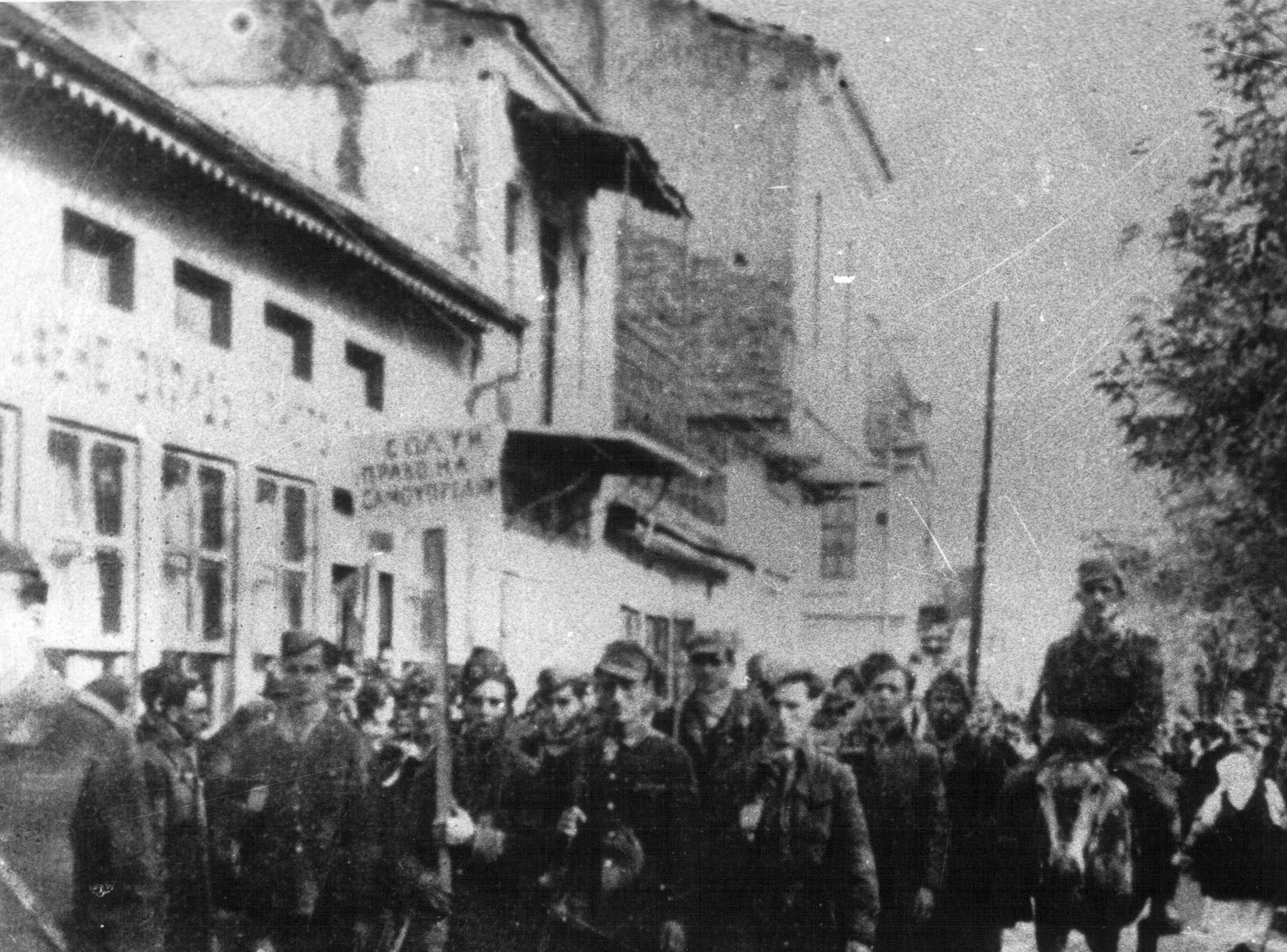 Srpskohrvatski / српскохрватски: Ulazak makedonskih partizana u oslobođeni Ohrid novembra 1944. godine. Na transparentu piše: "Solun pravo na samoopredeljenje".